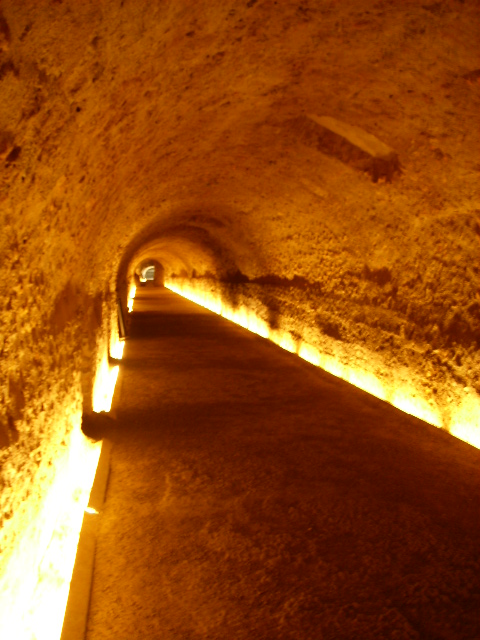 Zona restos Circo Romano, Tarragona, novembro 2009